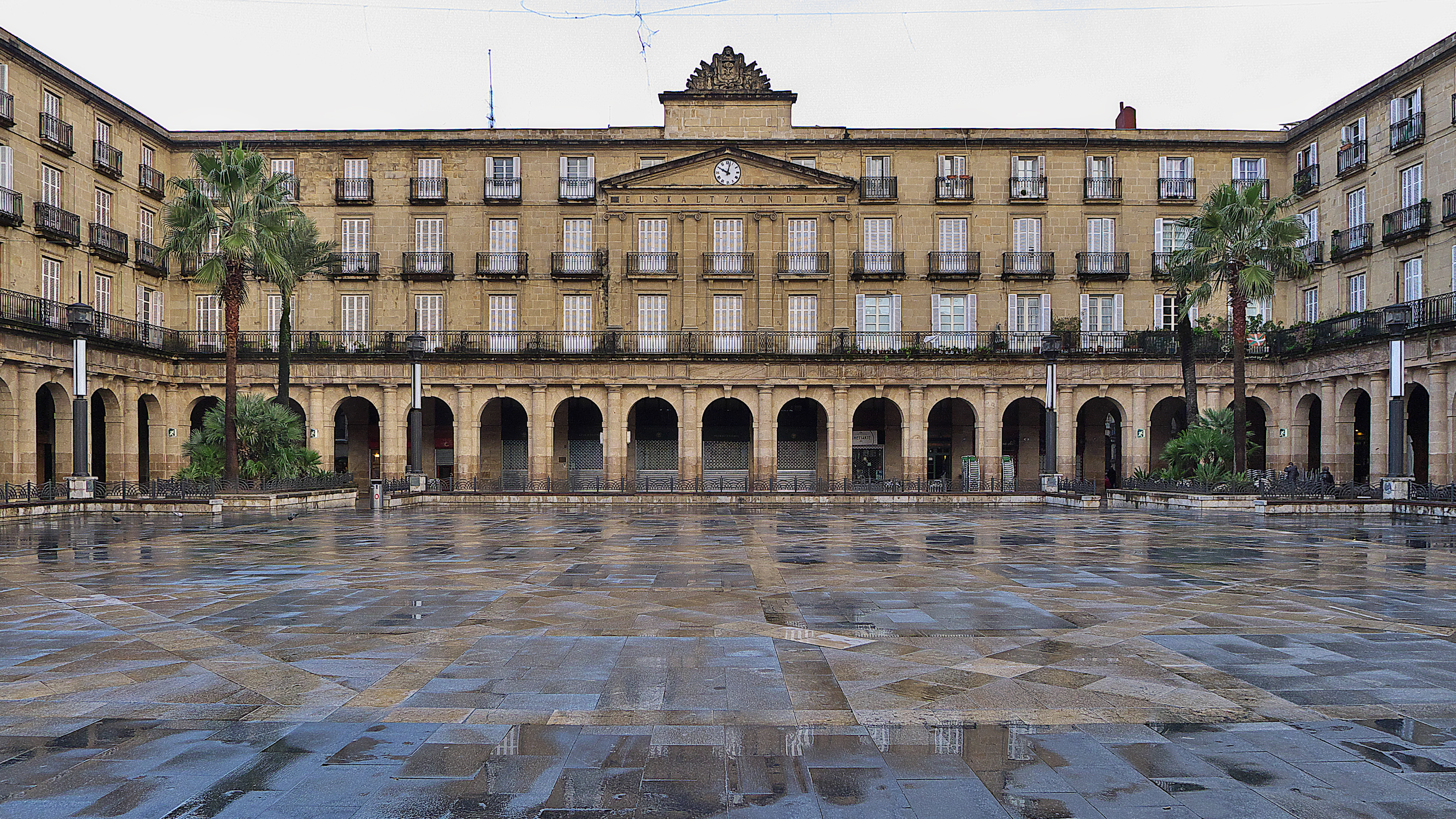 Plaza principal de Bilbao, proyectada por Silvestre Pérez Martínez en 1821.